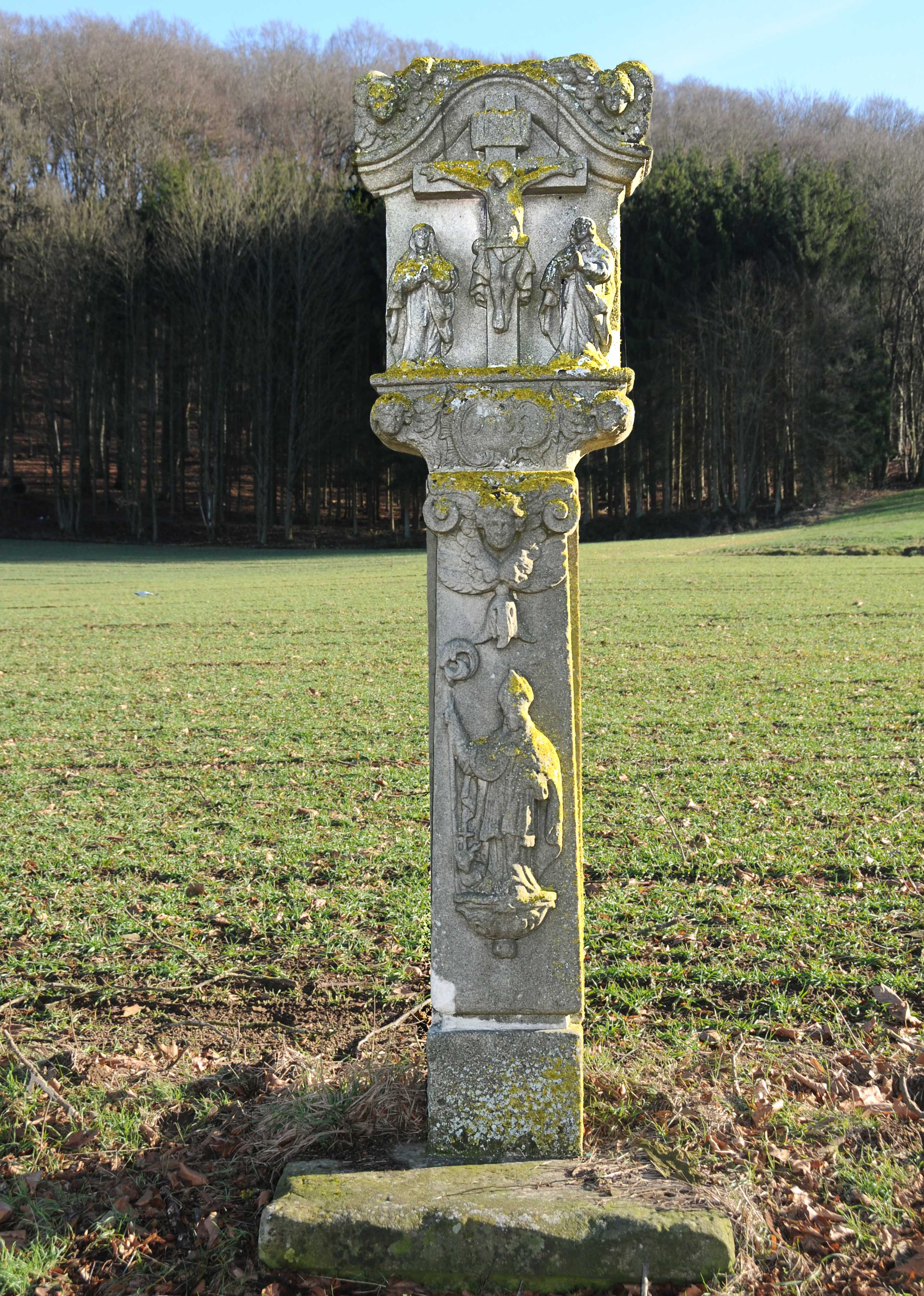 Kors ved Bruch ved Sëll.